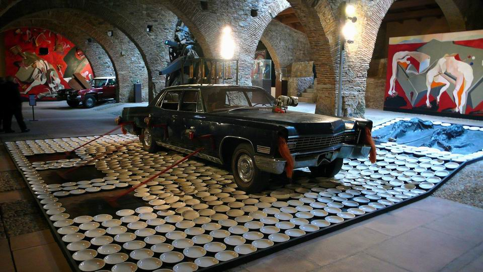 Durante una visita al Museo Vostell Malpartida me impresionó esta instalación de Wolf Vostell con el título "Fiebre de automóvil" del año 1973 e hice una foto, por lo cual no estoy violando ningún derecho de autor, esta foto es de mi autoría.